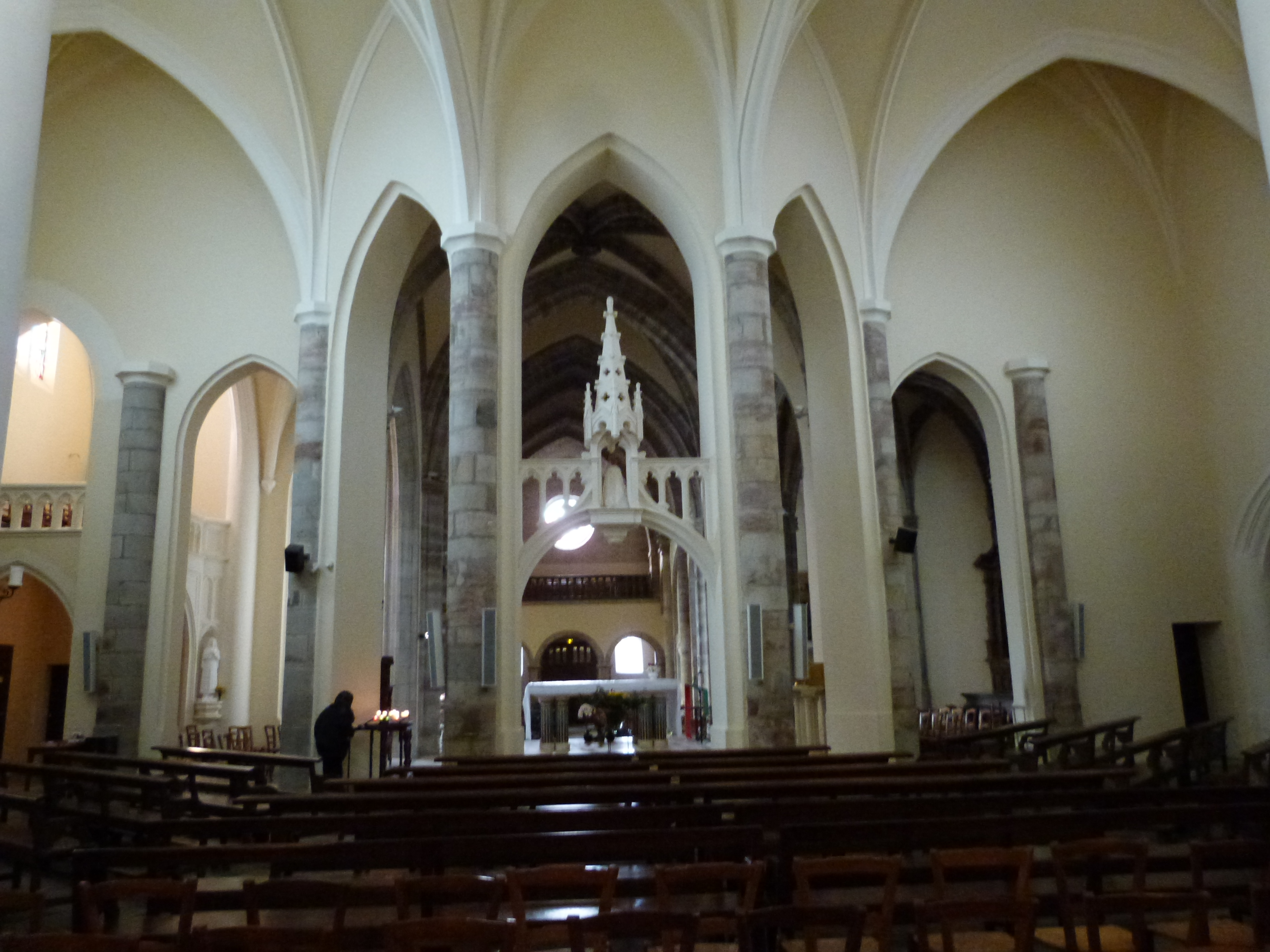 Basilique Notre Dame de Ceignac (partie la plus récente)